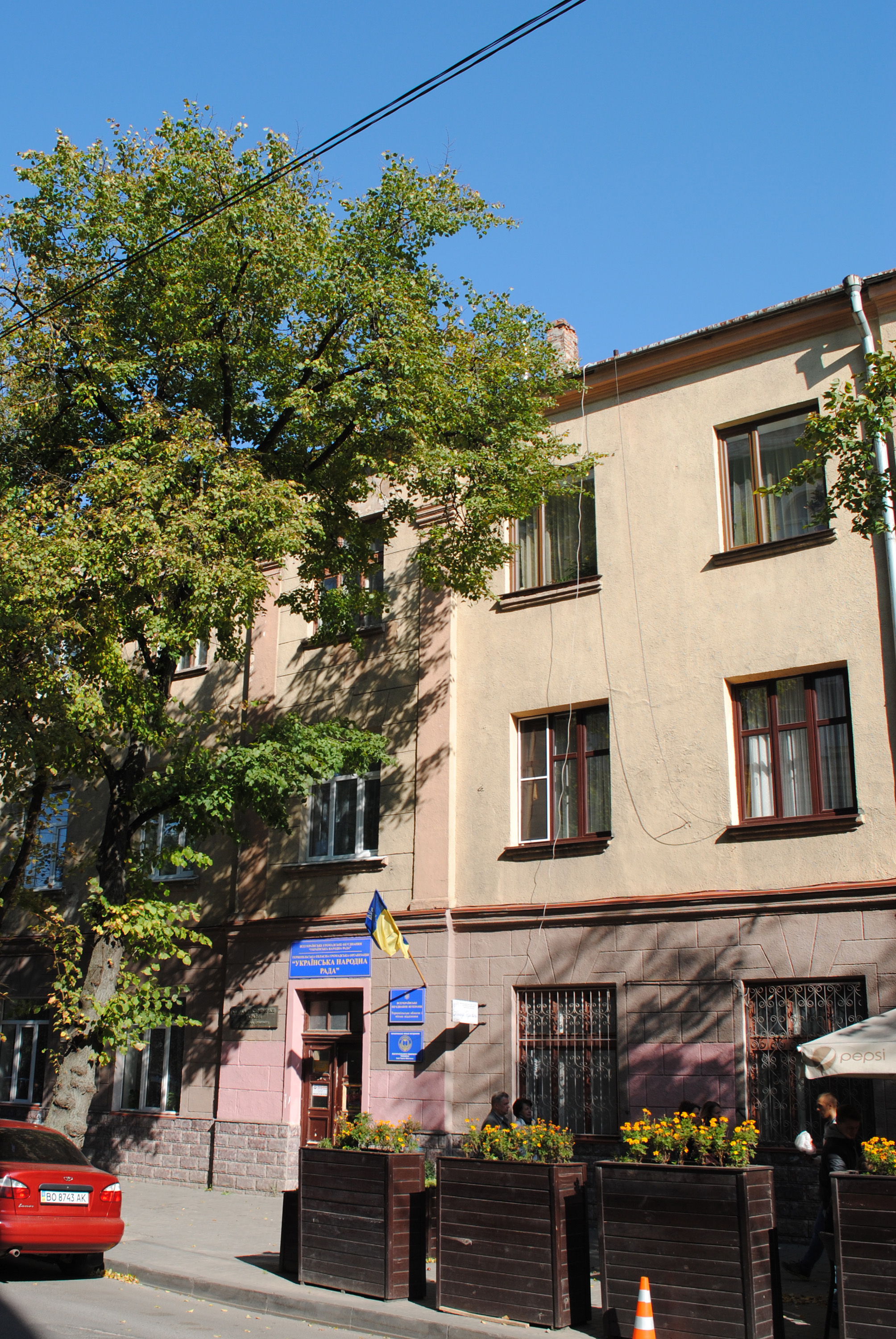 Адвокатська канцелярія Северина Даниловича (мур.), у якій зупинялись письменники Іван Якович Франко і Василь Семенович Стефаник, Тернопіль, вул. Й. Сліпого, 3. Нині тут знаходяться ТОО НСПУ, спілка ветеранів і міське товариство «Просвіта».